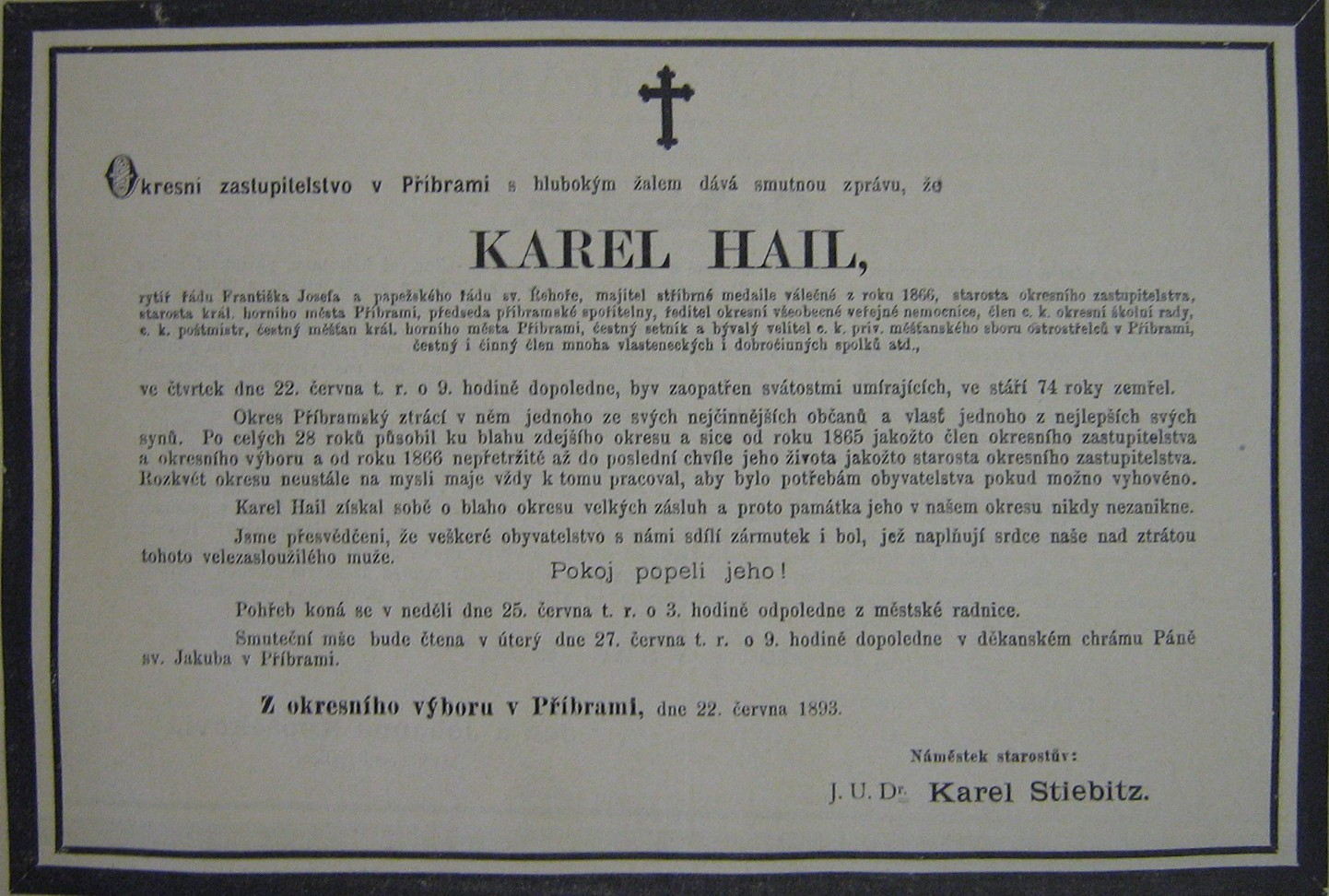 Oznámení o úmrtí Karla Haila, které zaskočilo nejednoho občana v roce 1893